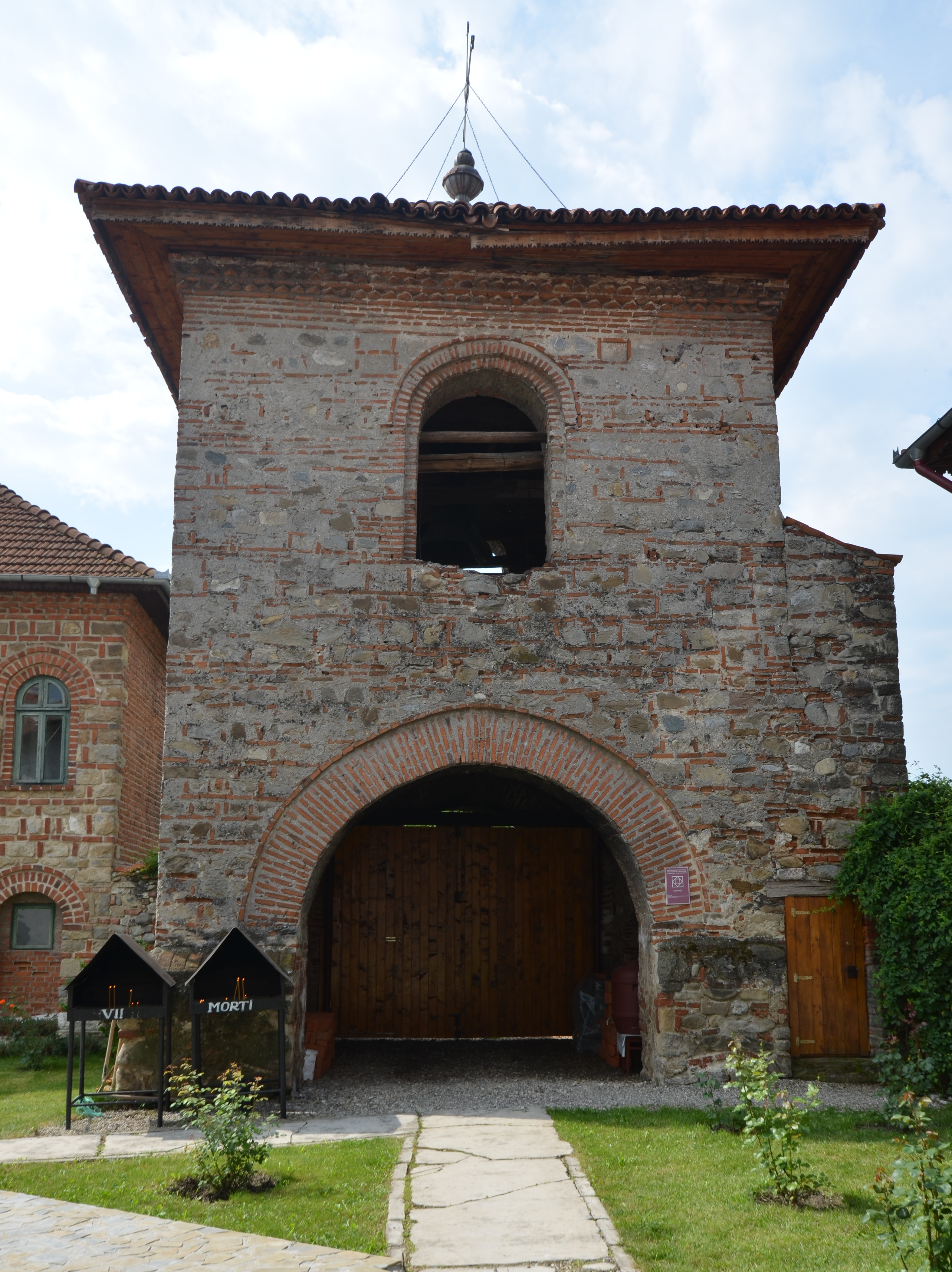 Mănăstirea Sărăcinești - Clopotniță 02